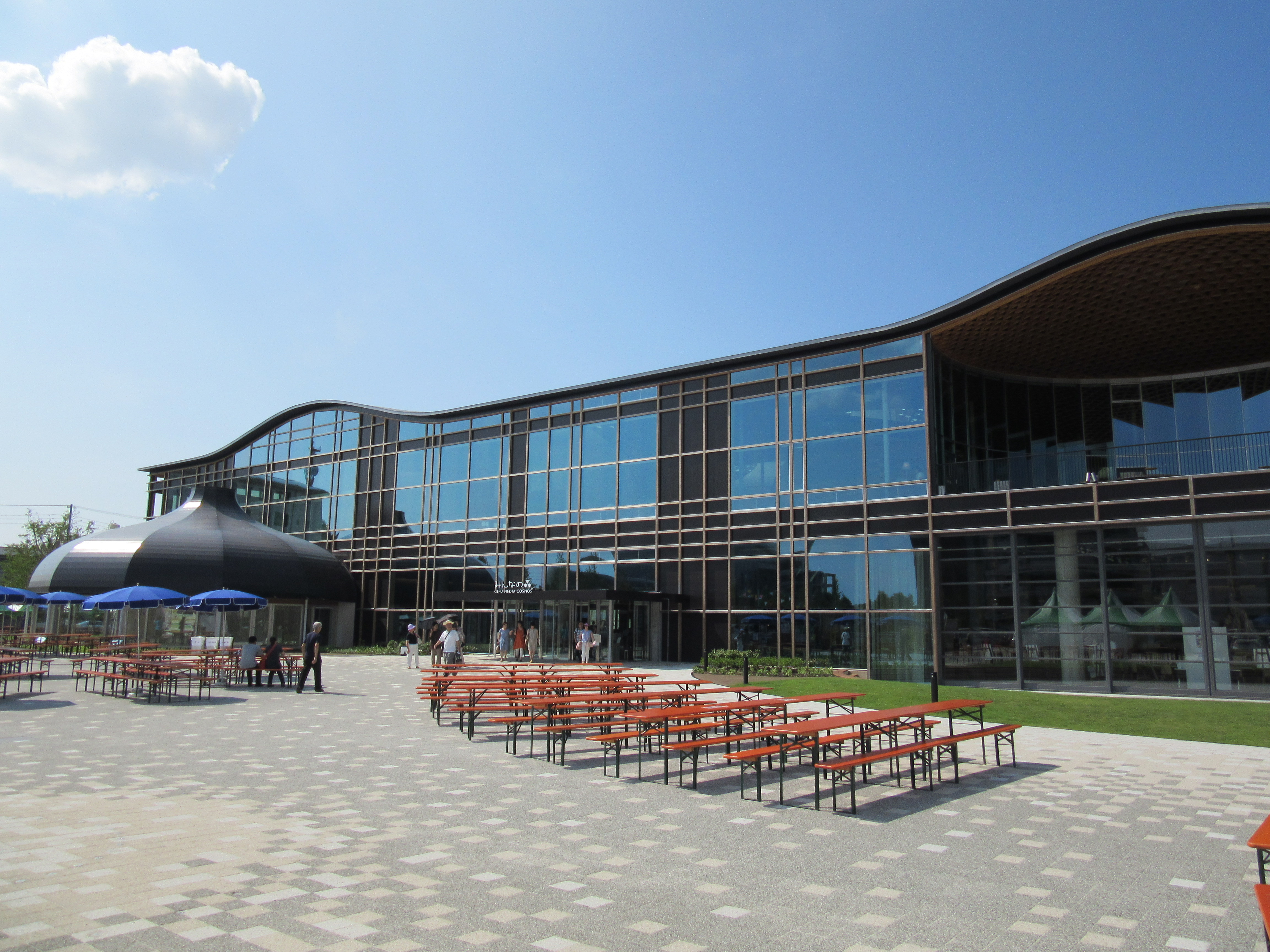 2015年7月18日に開館したみんなの森 ぎふメディアコスモス（岐阜市立中央図書館）。